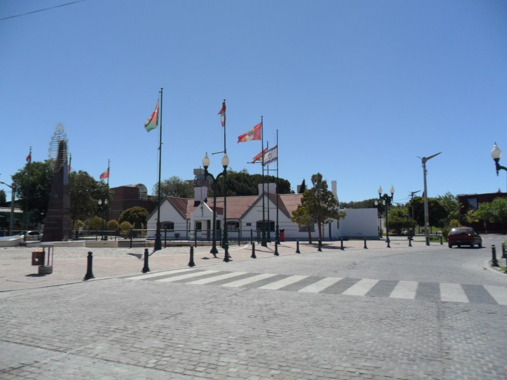 Estación Trelew del FCCC y Plaza de las Colectividades